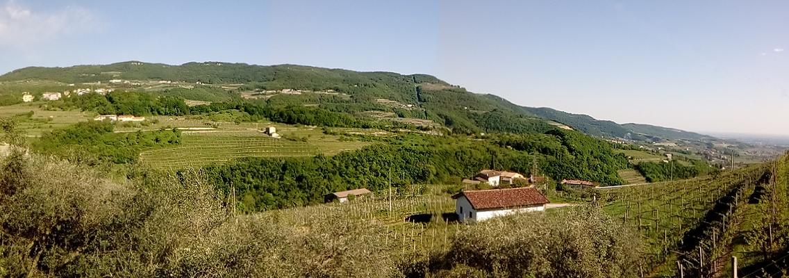 Panorama delle colline sopra Negrar viste dalla frazione di Torbe